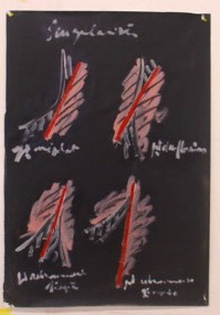 peinture